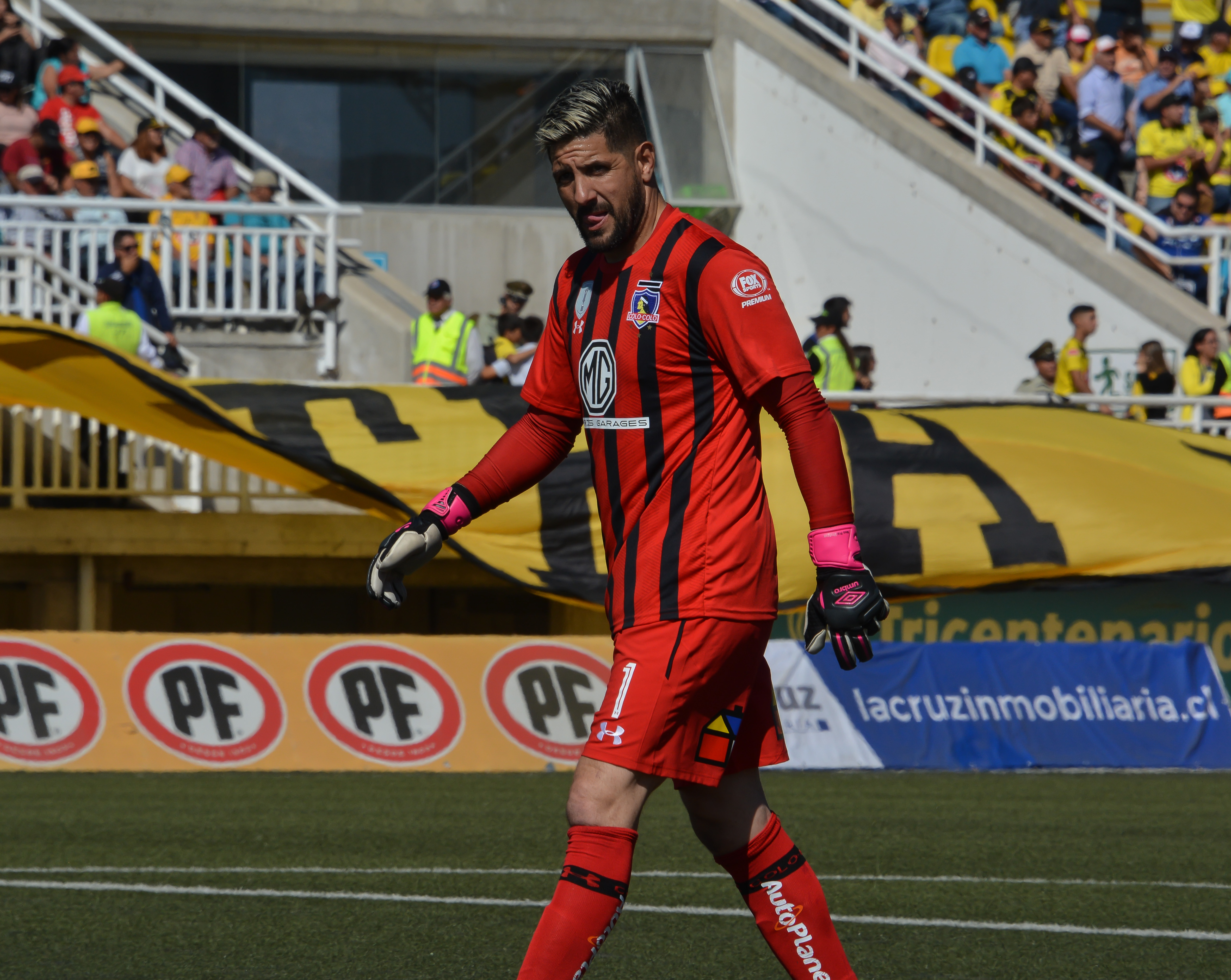 San Luis v Colo-Colo, Estadio Municipal Lucio Fariña Fernández, Quillota, Chile.